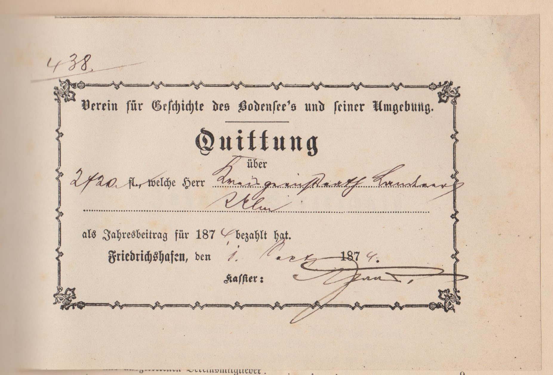 Deutschland (D) - Baden-Württemberg (BW) - Bodenseekreis (FN) - Friedrichshafen: Quittung des Vereins für Geschichte des Bodensees und seiner Umgebung für den Jahresbeitrag